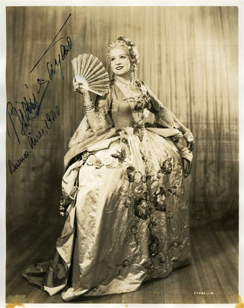 Soprano brasileña (1902-1999). En el personaje de Manon de Massenet. Teatro Colón, temporada 1940. Foto tomada de la Fototeca de la Biblioteca Nacional de la República Argentina.